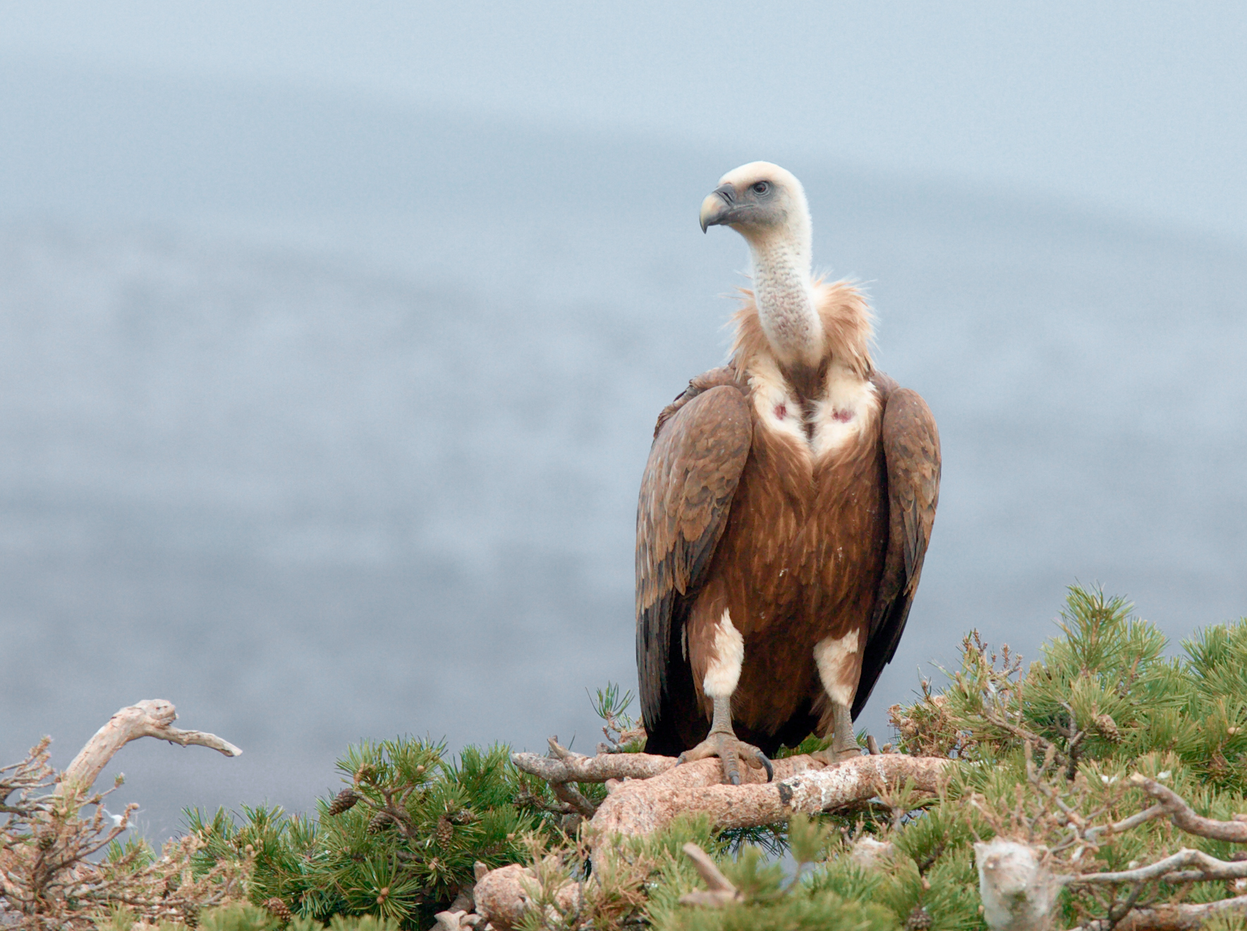 Gyps fulvus, Ayódar, Castellon, Comunidad Valenciana, Spain